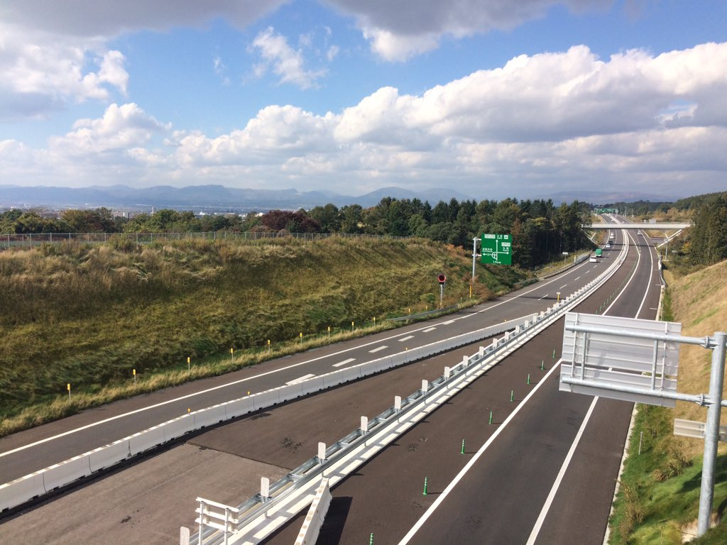 hakodate-shinsoto-kanjo